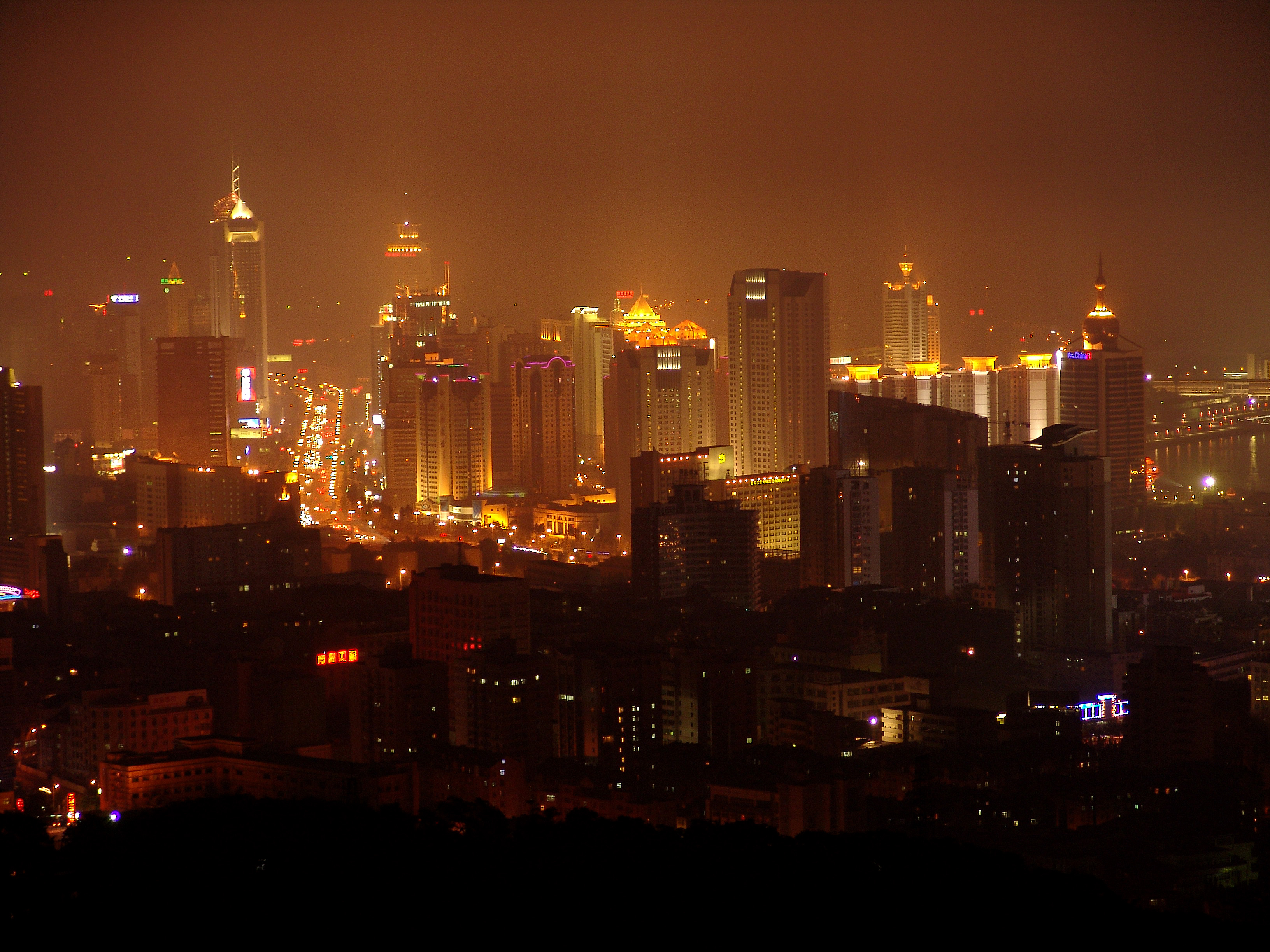 Ночной Циндао, вид с телевышки